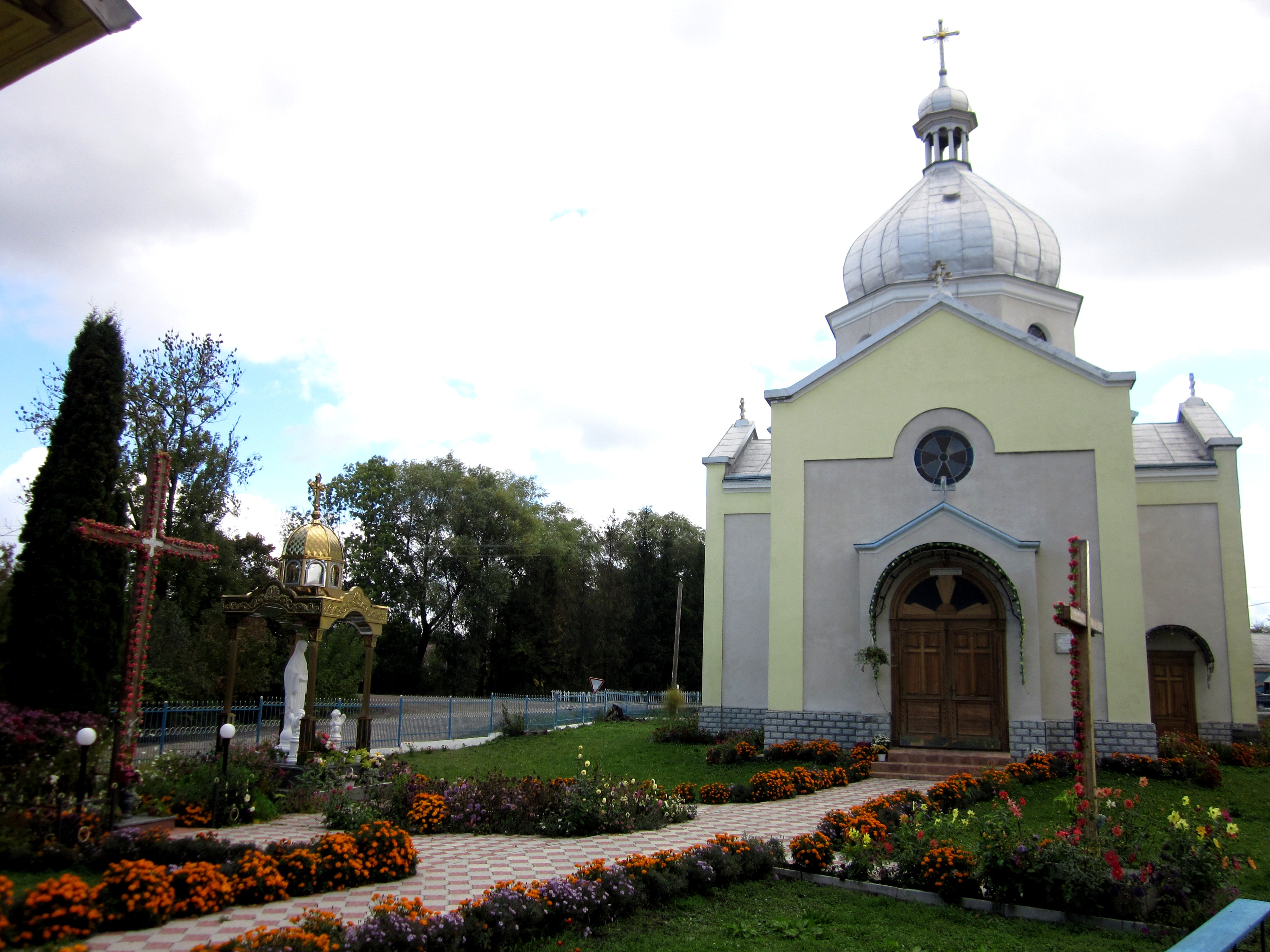 Церква Святої Трійці с.Олесине Козівського району Тернопільської області